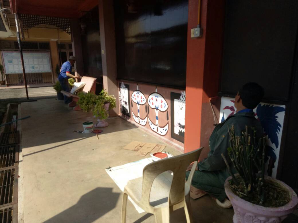 Ahli PIBG sekolah turut sama turun padang sedia membantu